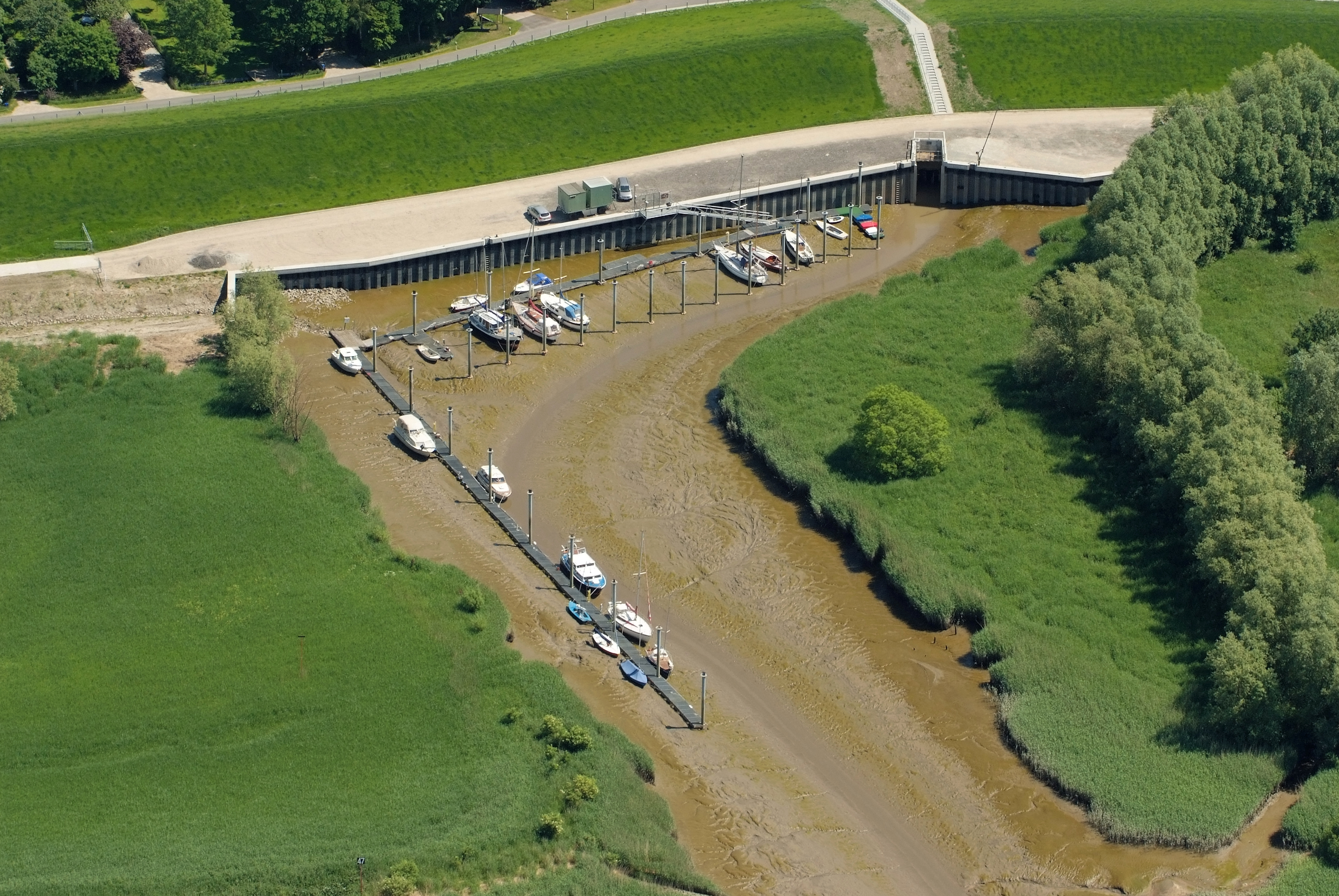 Sportboothafen Rechtenfleth (Ortsteil von Hagen im Bremischen / Sandstedt) bei Ebbe Fotoflug vom Flugplatz Nordholz-Spieka über Cuxhaven und Wilhelmshaven